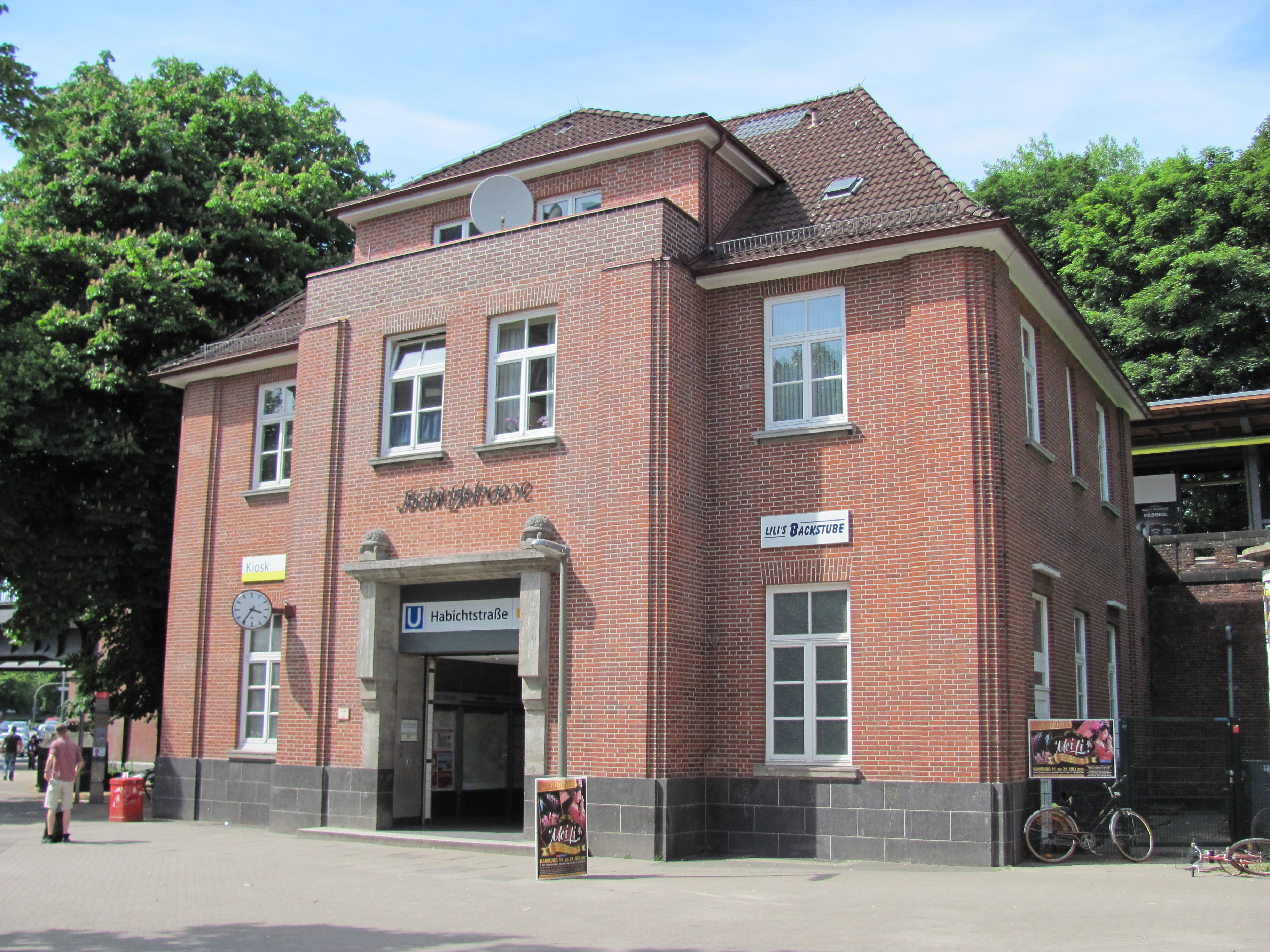 U-Bahnhof Habichtstraße in Hamburg-Barmbek-Nord